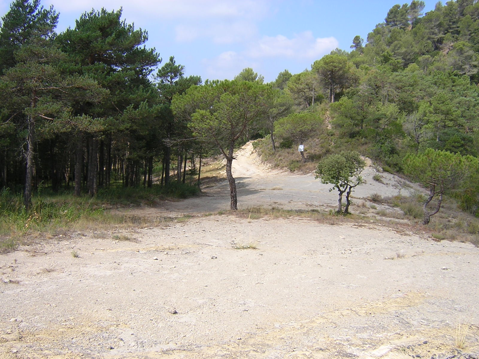 Colljovà (Monistrol de Calders, Moianès)